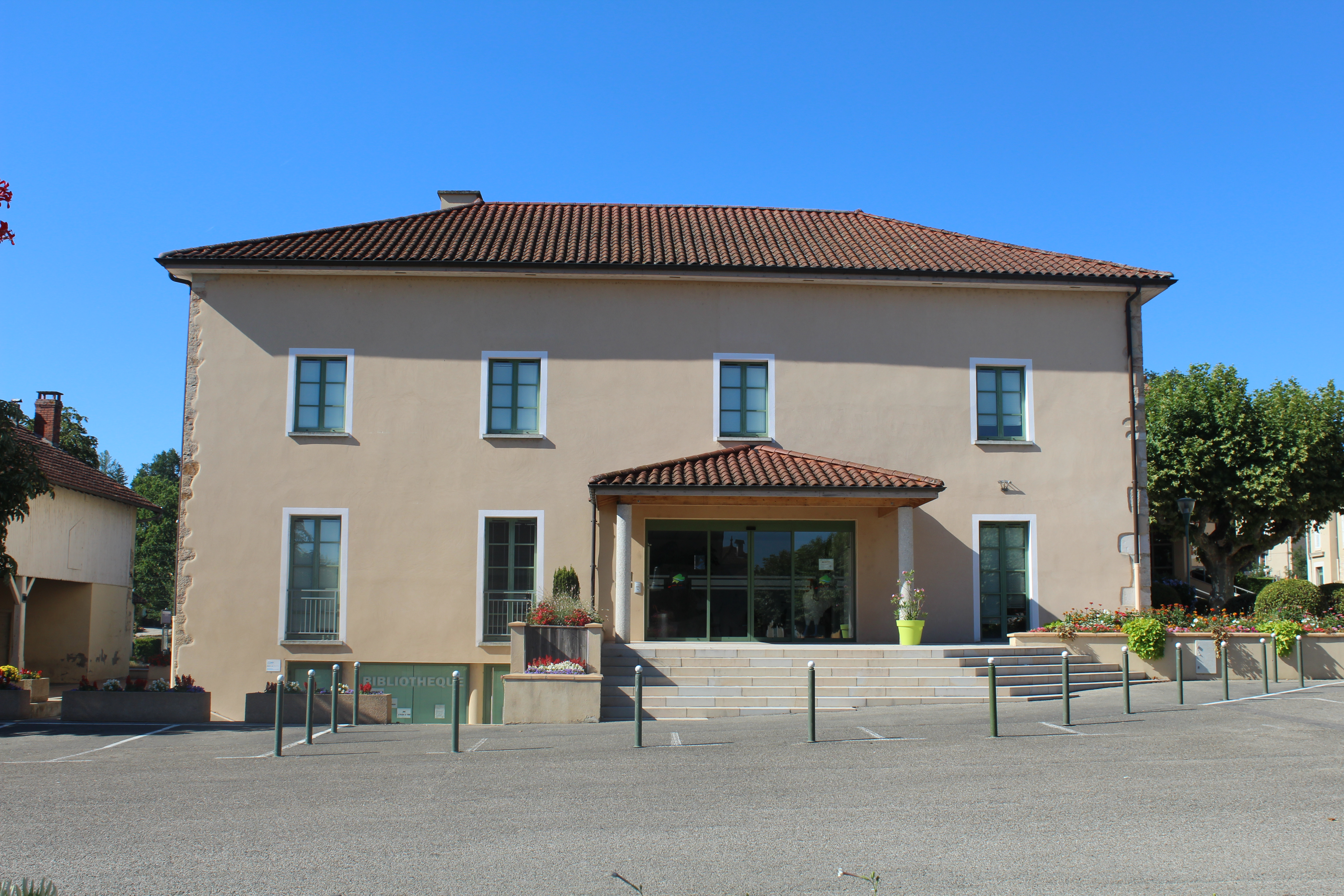 Mairie de la commune de Mézériat